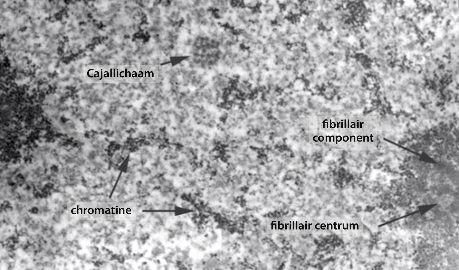 Een transmissie-elektronenmiscroscopische opname van een cajallichaam, chromatine en fibrillaire componenten.